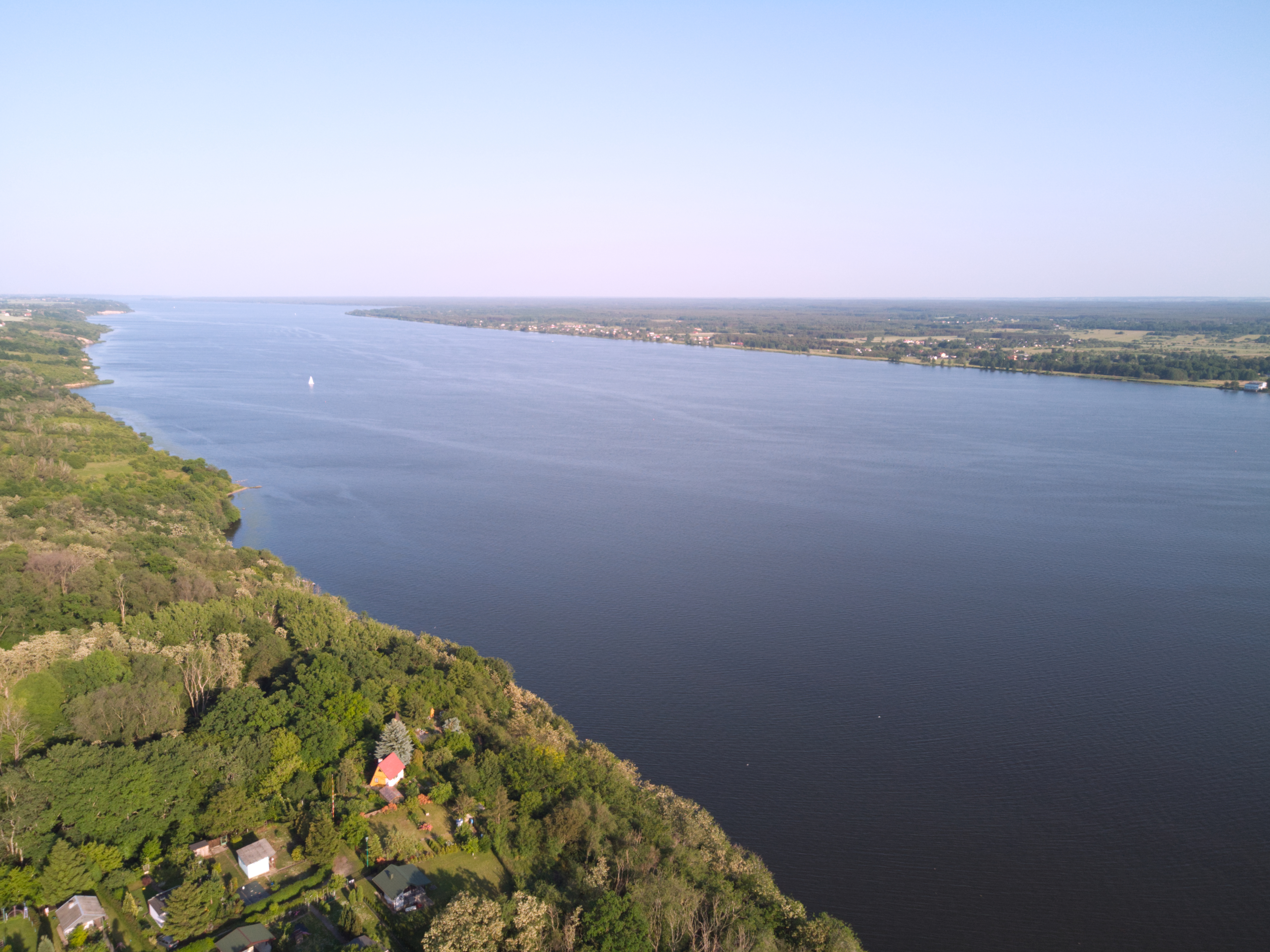 Zalew Włocławski (2020 r.)